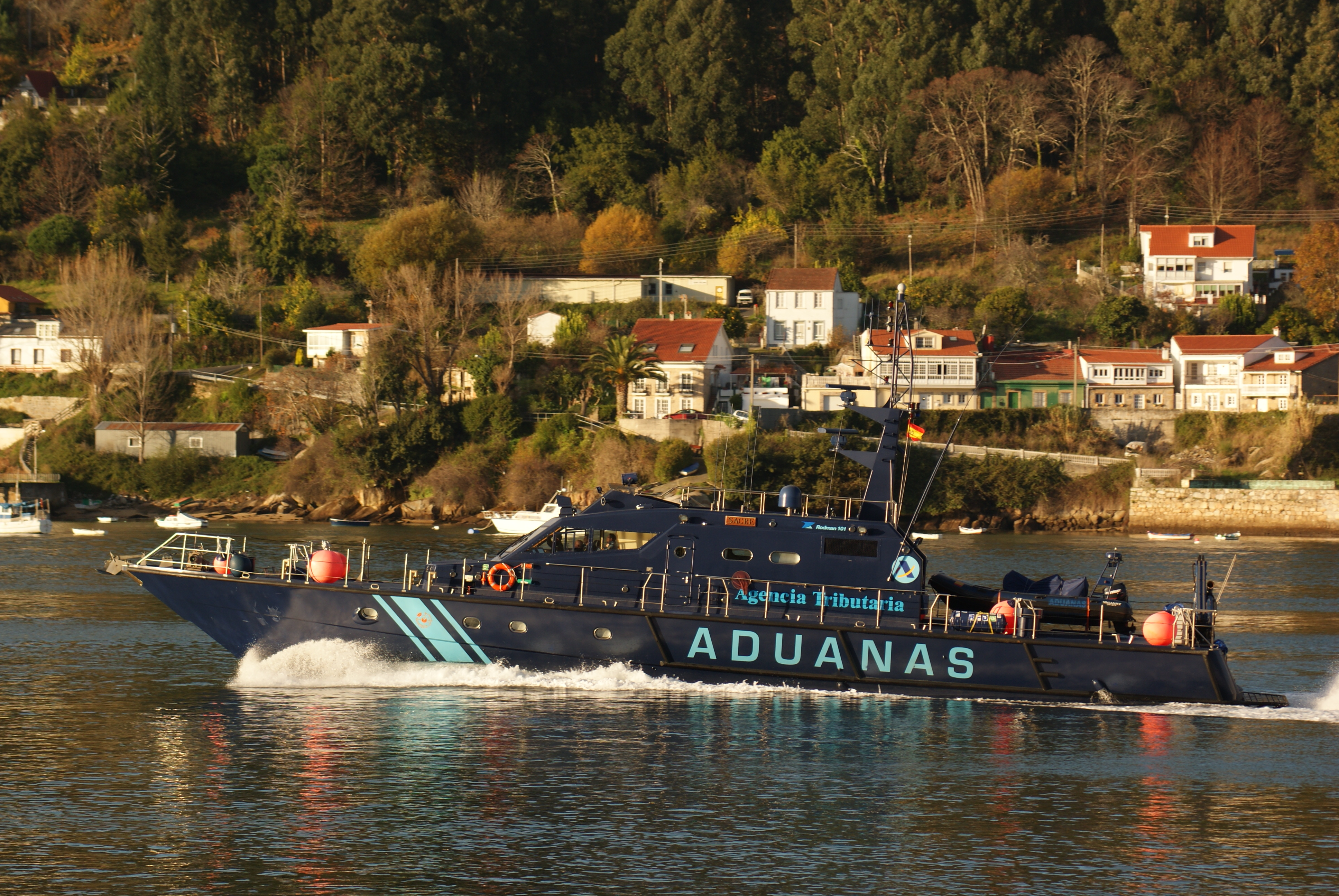 País: España - Vigilancia Aduanera Clase, [Tipo]: Gerifalte, (Rodman-101). Constructor: Rodman Polyships, Vigo, Spain. Desplazamiento ( toneladas ): 102. Dimensiones ( metros ): 31,36 x 6 x 3,4 Propulsión: 2 x diesels MTU series 4000 ( 4.800 cv ), 2 x hidrojets MJP. Velocidad ( nudos ): 35. Autonomía ( millas ): 1.000. Dotación: 10. Capacidad de transporte: combustible: 16.000 litros.